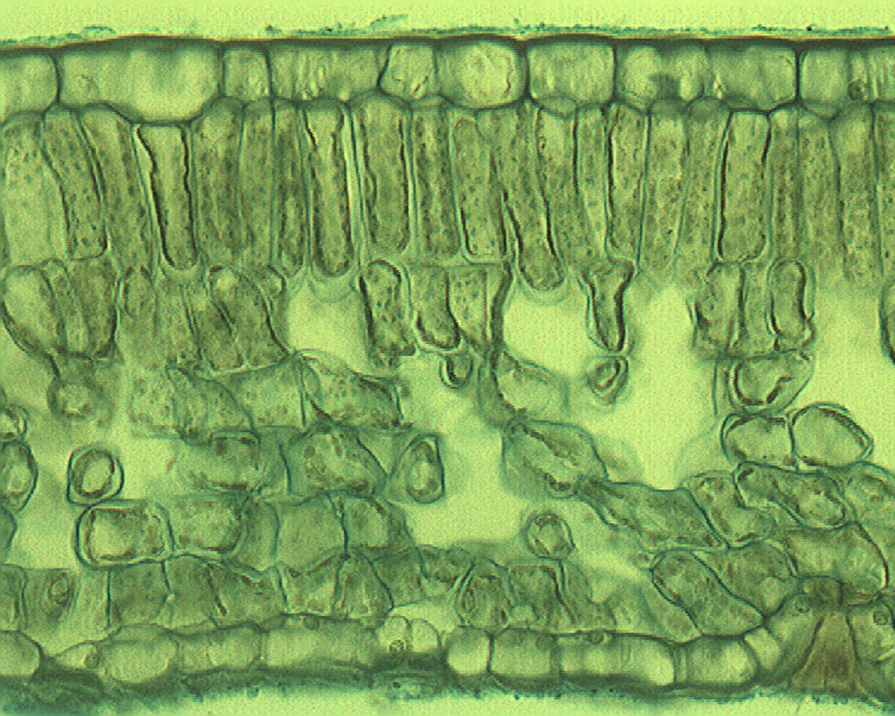 Querschnitt durch ein bifaziales Laubblatt